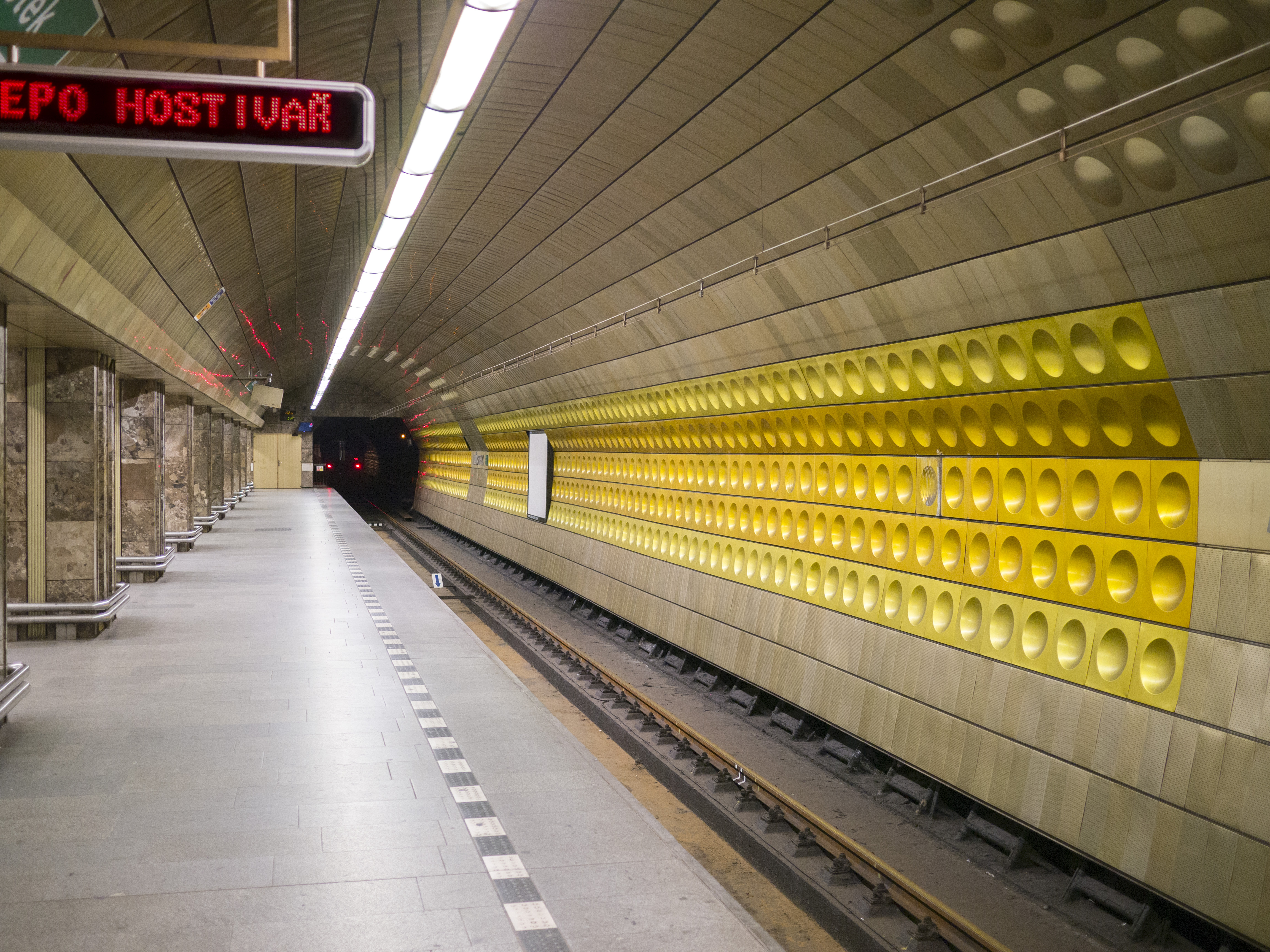 Prag Metro Mustek